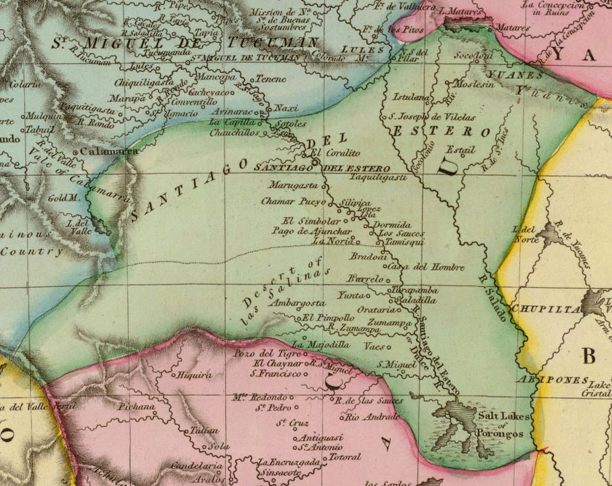 Fragmento del mapa físico político del Virreinato del Río de la Plata (o La Plata), publicado en Londres, el 25 de enero de 1812. Se puede apreciar en el mismo la jurisdicción correspondiente al Cabildo de Santiago del Estero.